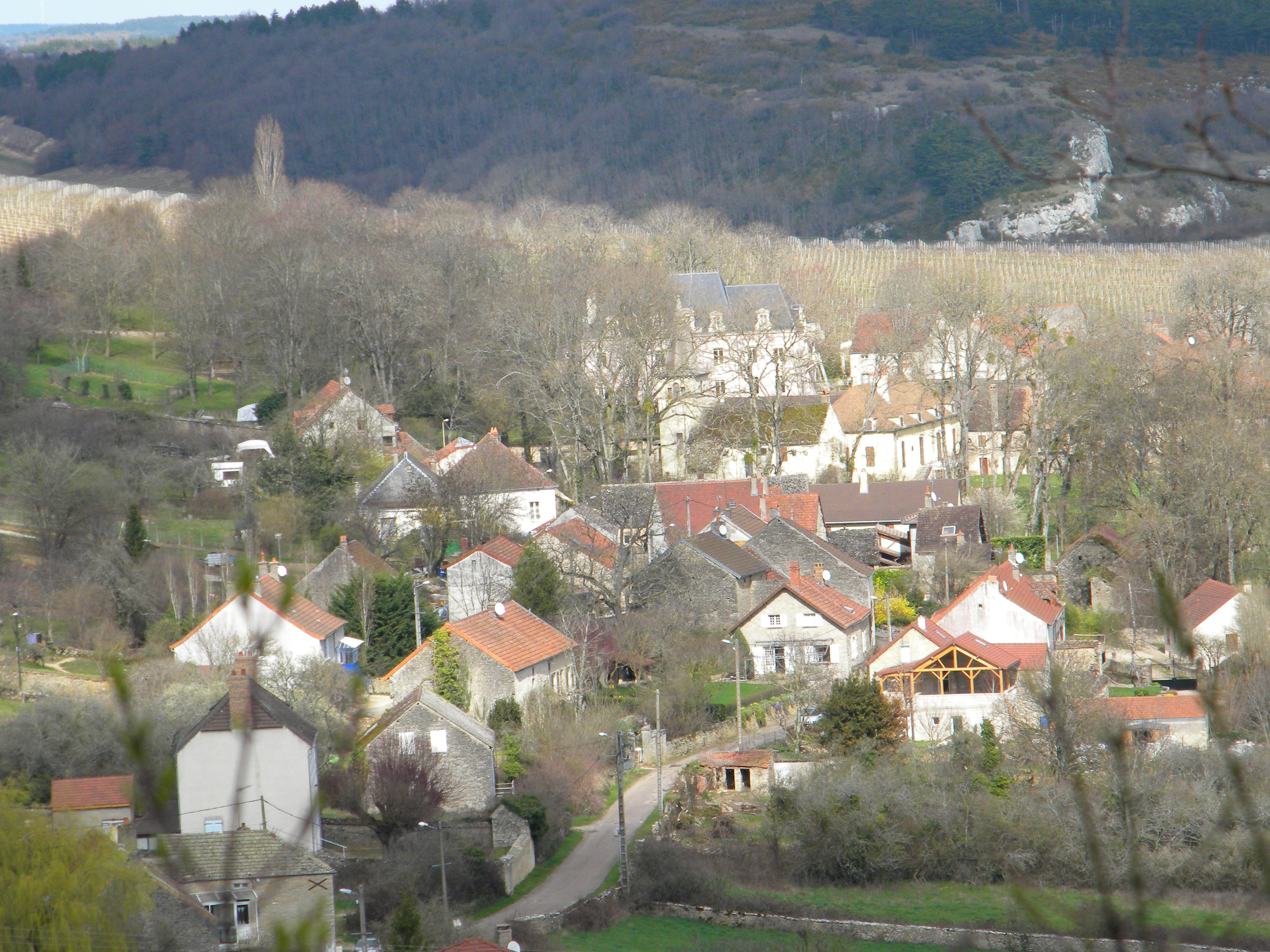 Baubigny (Côte-d'Or, Bourgogne, France). Hameau d'Évelle.